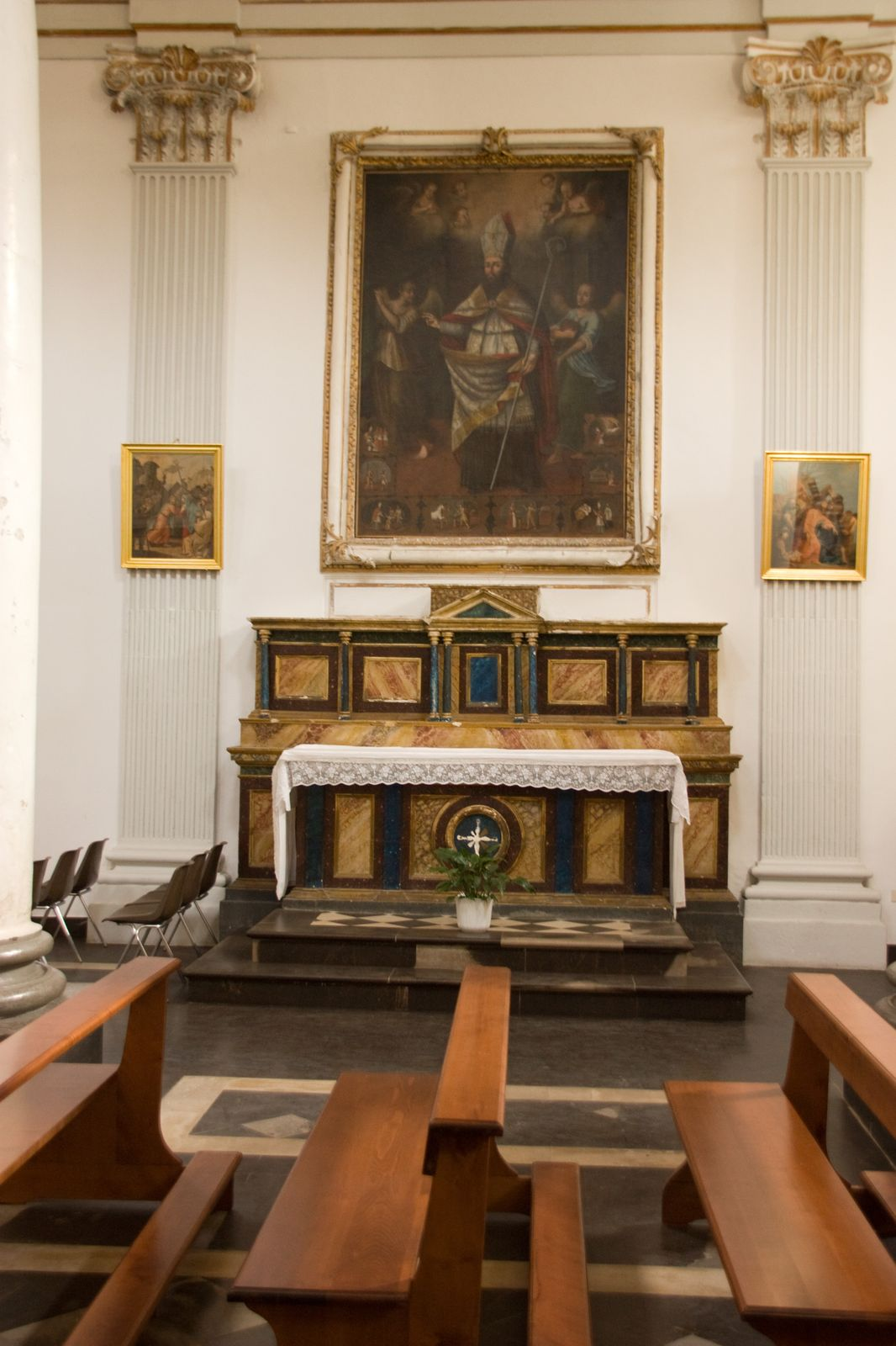 Chiesa delle Amine del Purgatori, Ragusa Ibla, Sicile, Italie